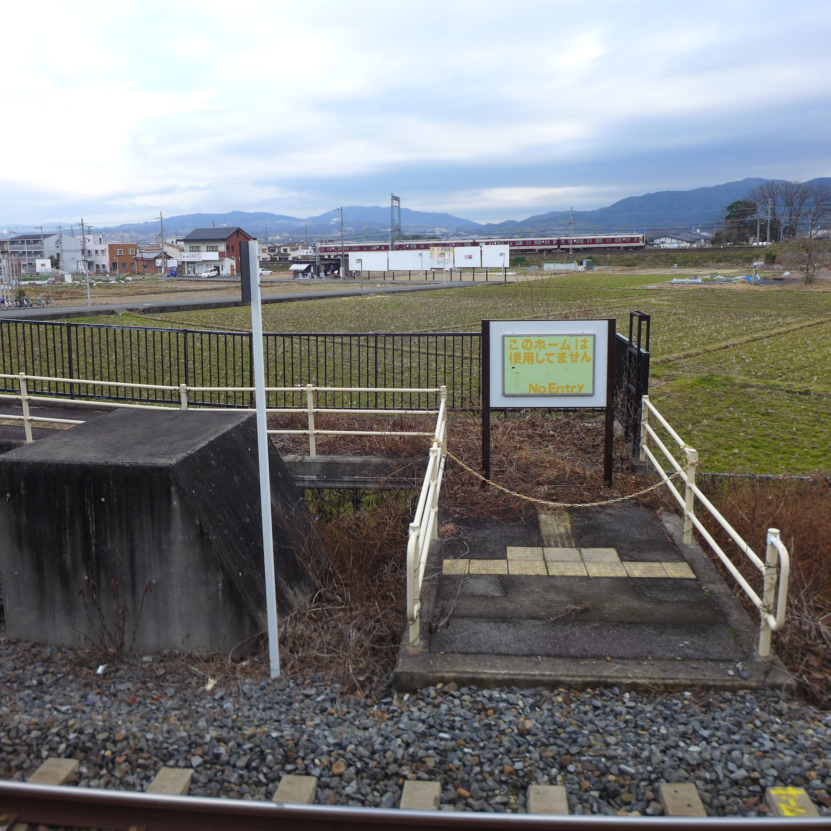 JR同志社前旧2番線へ通じていた通路の残骸。構内踏切は2017年1月現在撤去されている